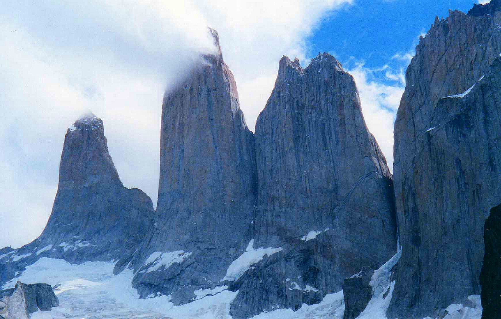 Torres del Paine, Chile